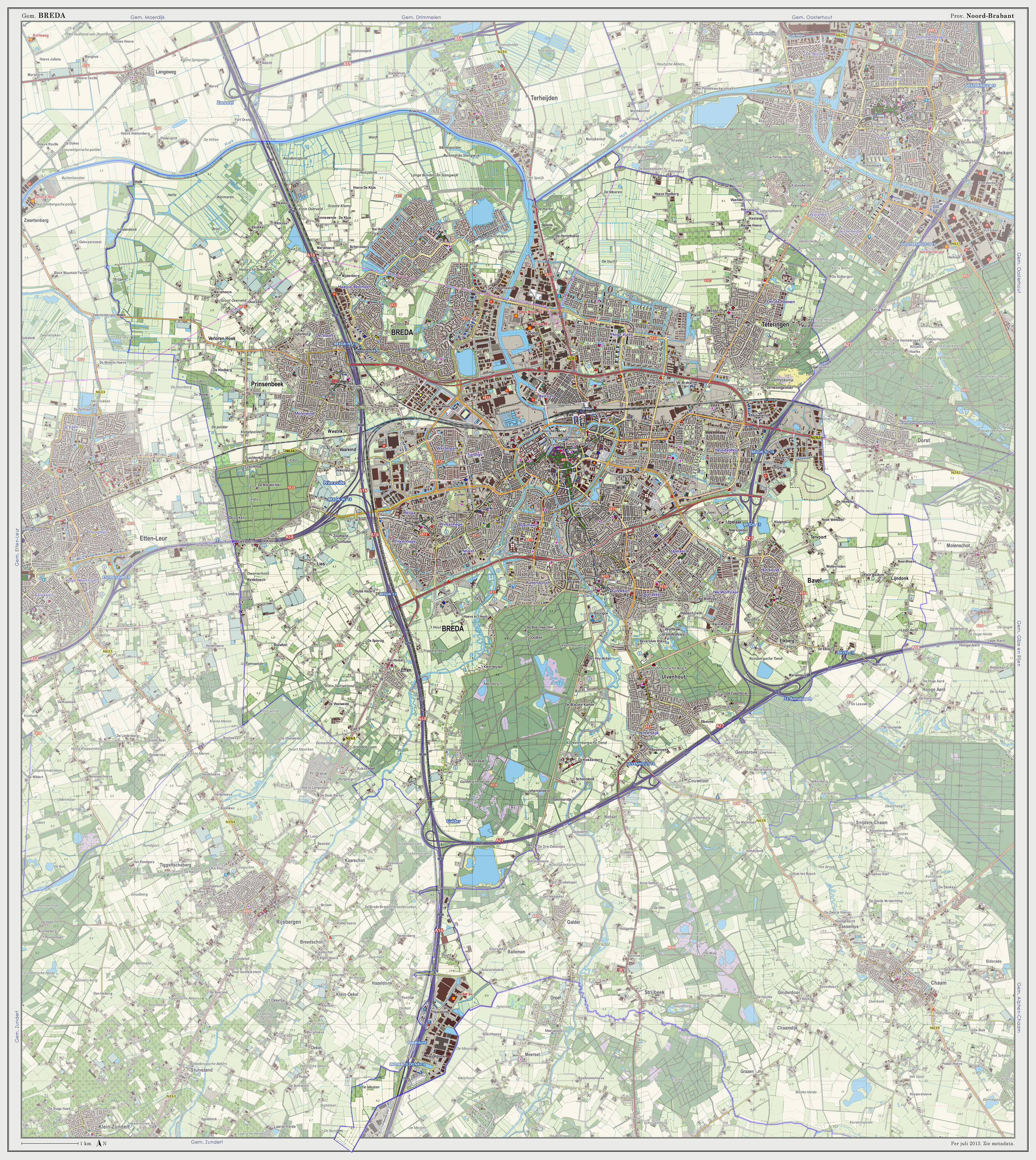 Topografische kaart van gemeente Breda (2013). Samengesteld door Jan-Willem van Aalst op basis van de GML open geodata van de BRT/Top10NL (basisregistratie Topografie, Kadaster 2011), vrijgegeven door Kadaster onder de Creative Commons BY licentie. Additionele gegevens uit BAG (8 juli 2013), uit de Open Street Map (9 juli 2013) en uit de Risicokaart. Peildatum kaartbeeld: 9 juli 2013. Zie ook Gemeentenatlas.nl Samenstelling en kleurenschema: Jan-Willem van Aalst, met QuantumGIS en Photoshop. Zie ook de Legenda.